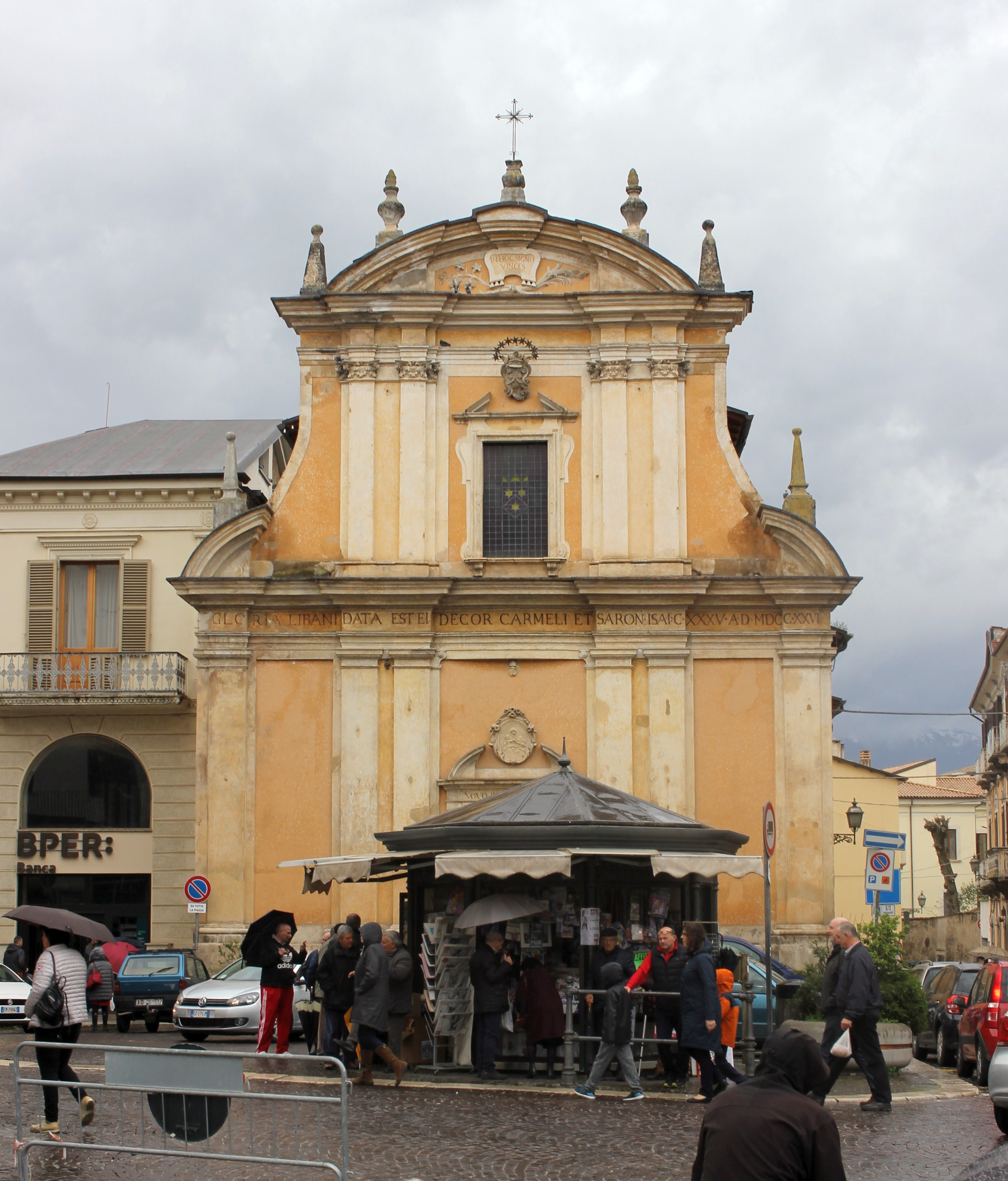 Chiesa della Madonne del Carmine in Sulmona